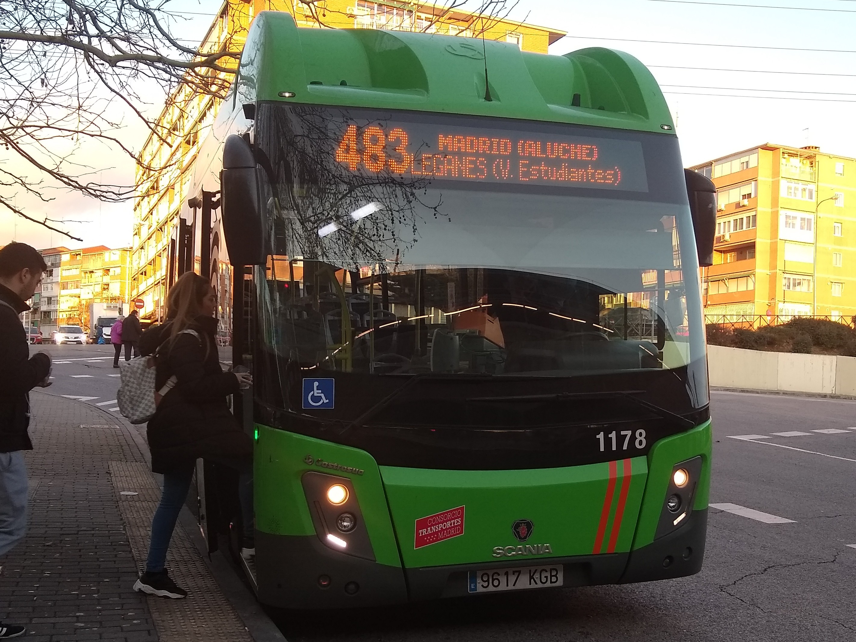 Autobús interurbano de Madrid